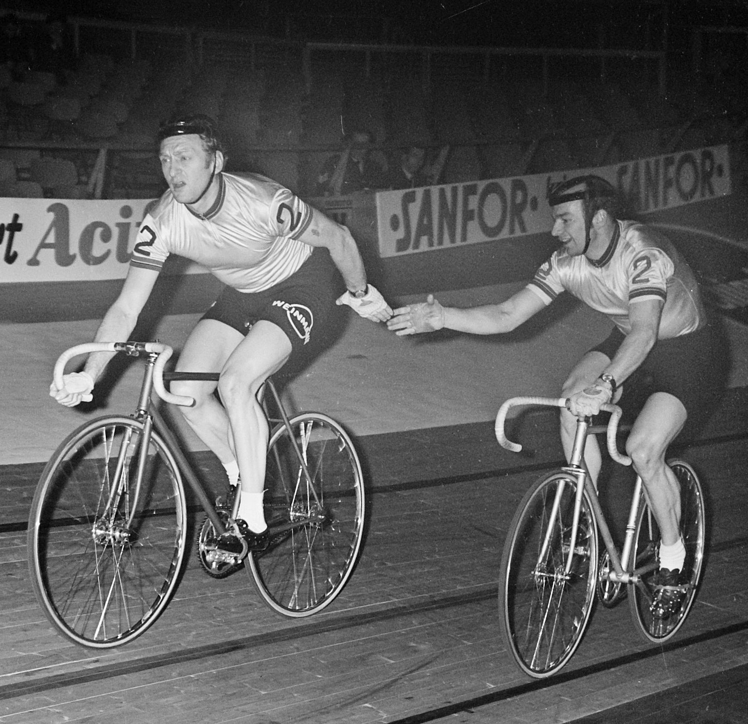 Zesdaagse wielrennen in RAI Amsterdam. Klaus Bugdahl en Dieter Kemper wisselen